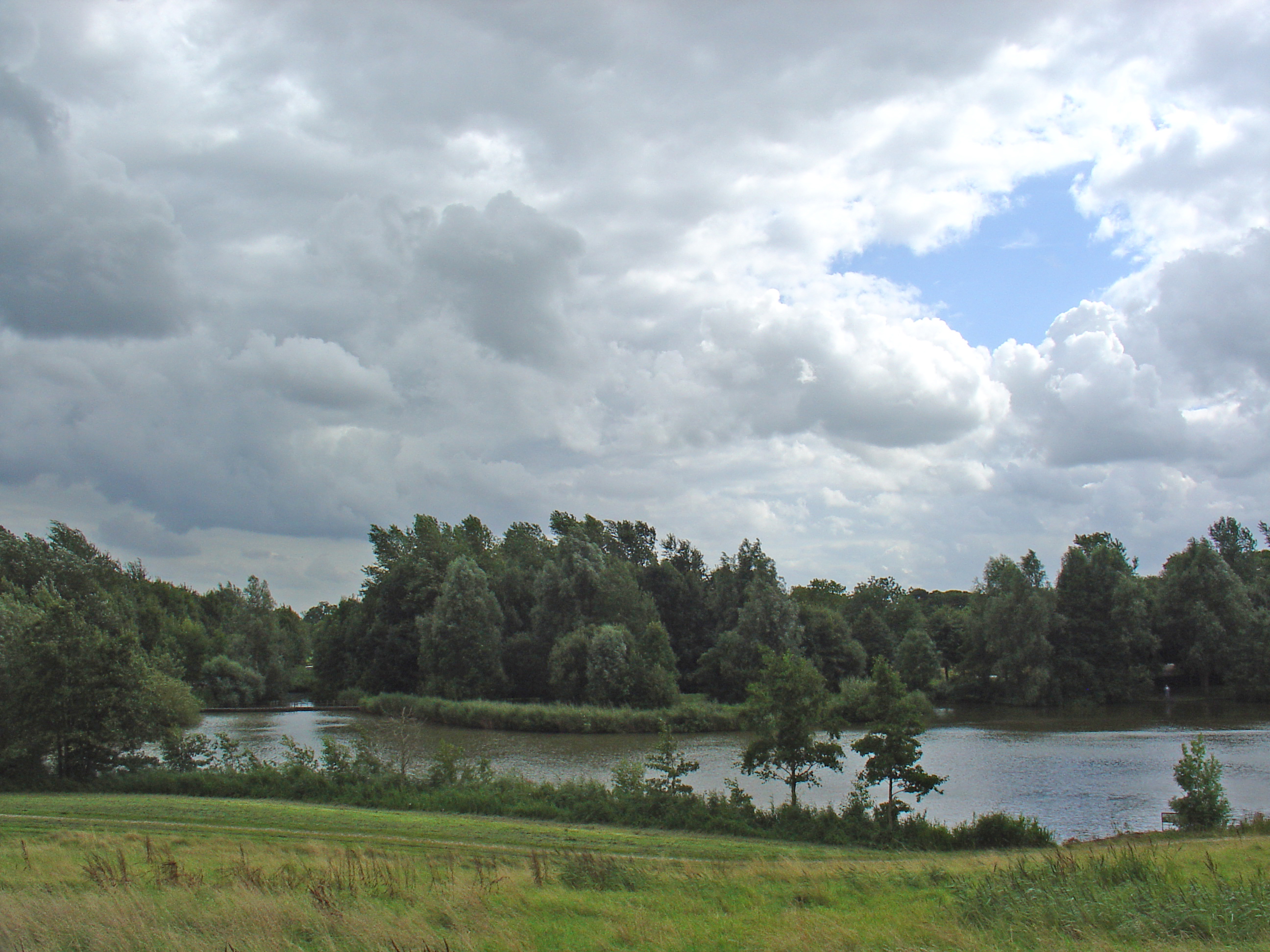 Landgoed van Ekenstein (bij Appingedam) ontworpen door Lucas Pieters Roodbaard